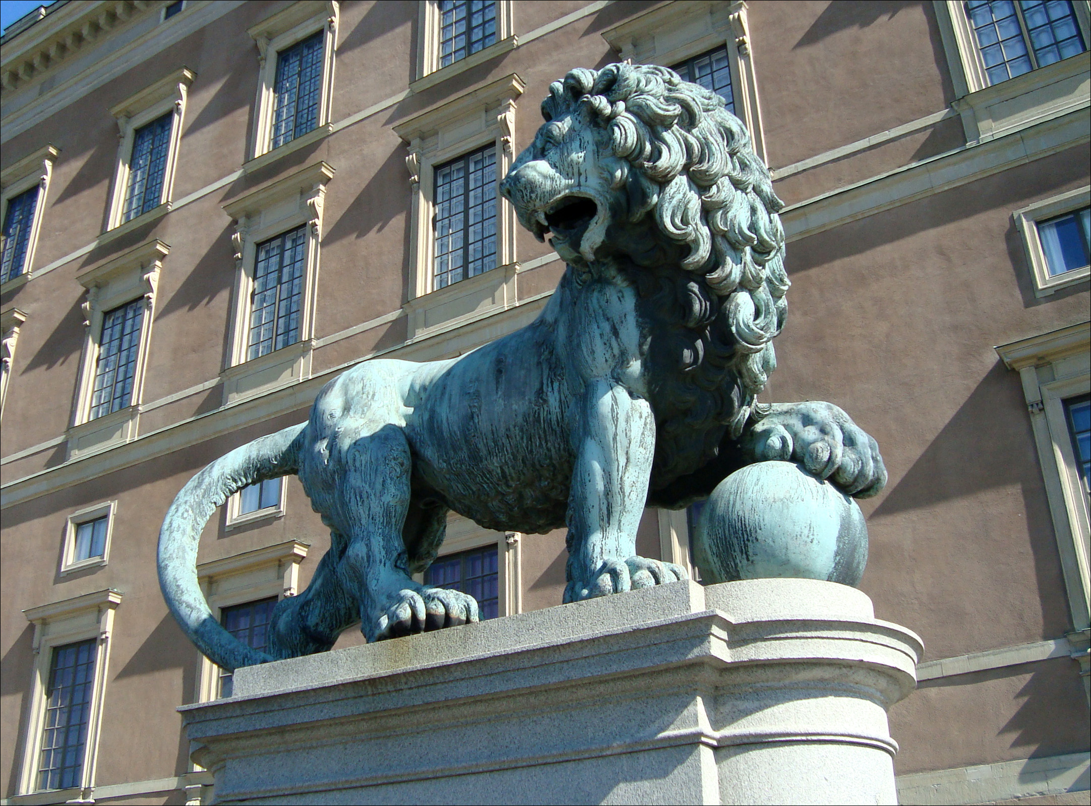 Lion